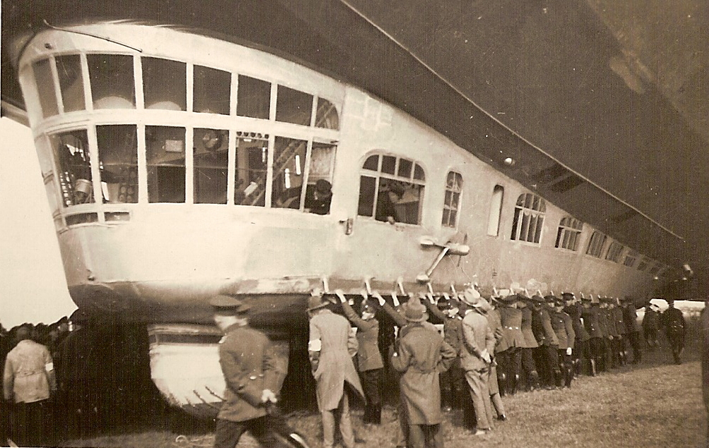 People holding down Zeppelin LZ 127